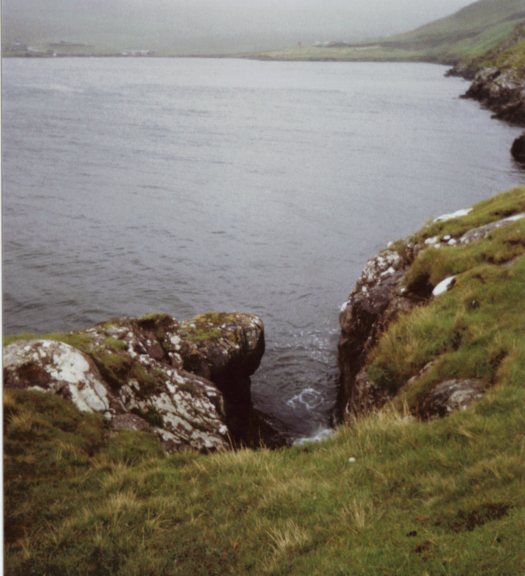 Die Schlucht "Gálgagjógv" am Meer nordöstlich von Øravík. Im Falle einer Hinrichtung wurde über die Schlucht ein Balken gelegt, an dem die Verurteilten gehängt wurden.